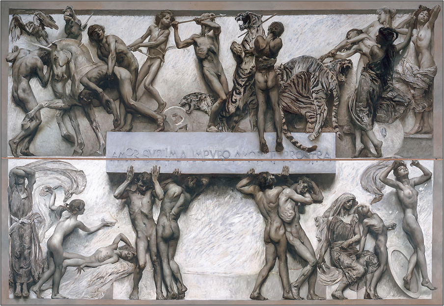 Джулио Аристид Сарторио «Любовь», 1906-1907, Галерея современного искусства, Венеция